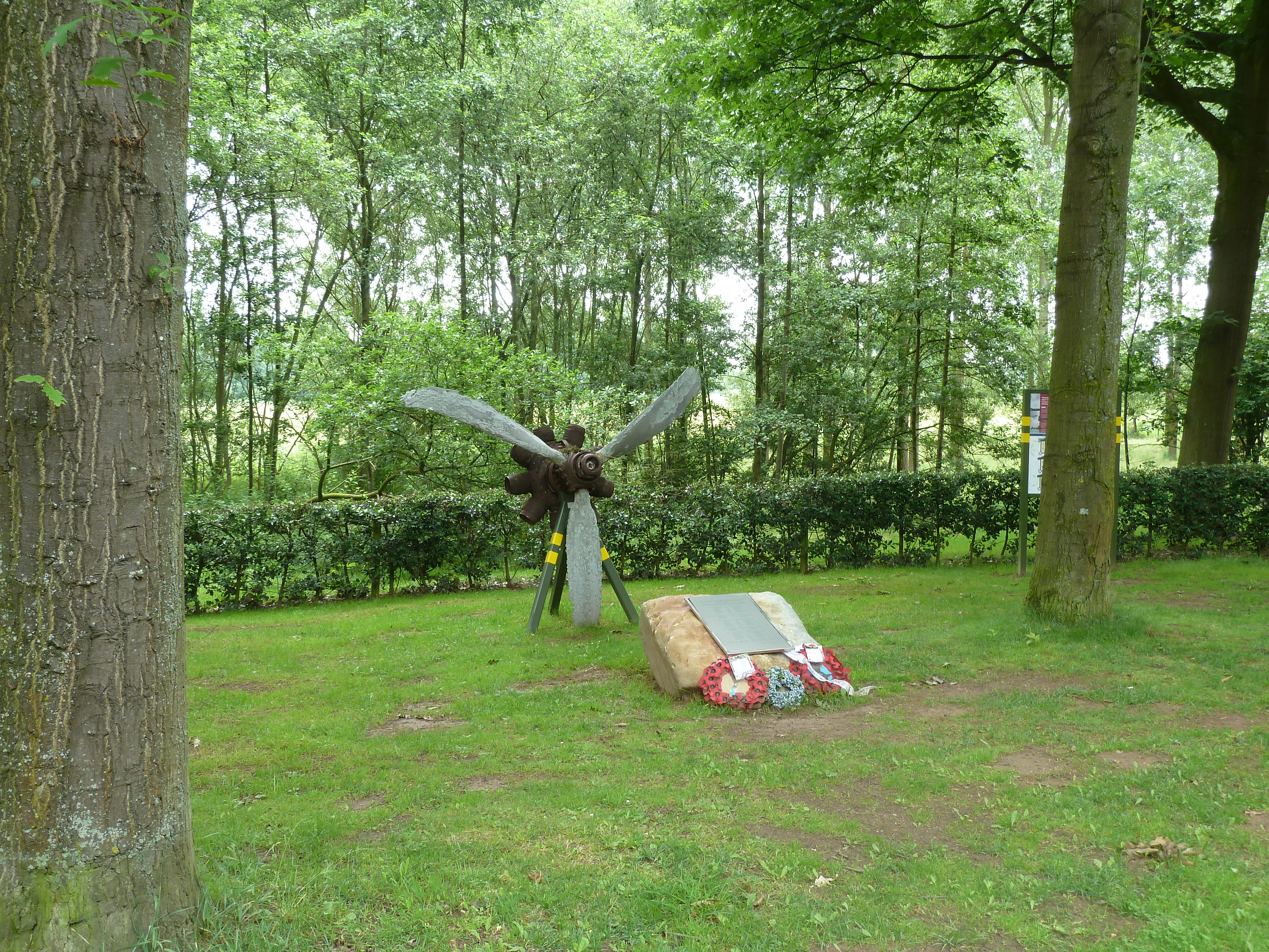 Vliegtuigen en hun bemanningen tijdens de Tweede Wereldoorlog neergestort in het Herkenboscher Broek, Vlodropper Broek en het Meinweggebied, Herkenbosch, Limburg, Nederland